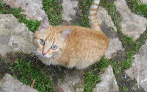 Variante a pelo rosso